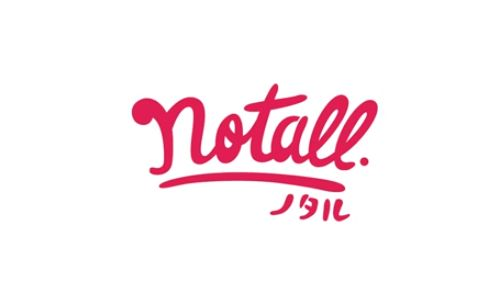 NOTALLロゴ